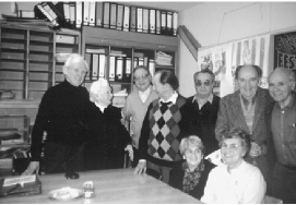 Lore Wolf (2.v links) bei der Vorbereitung der Gründungsversammlung. Lore Wolf war Teilnehmerin der Verfassungsberatenden Versammlung beratenden Landesversammlung des Landes Hessen.